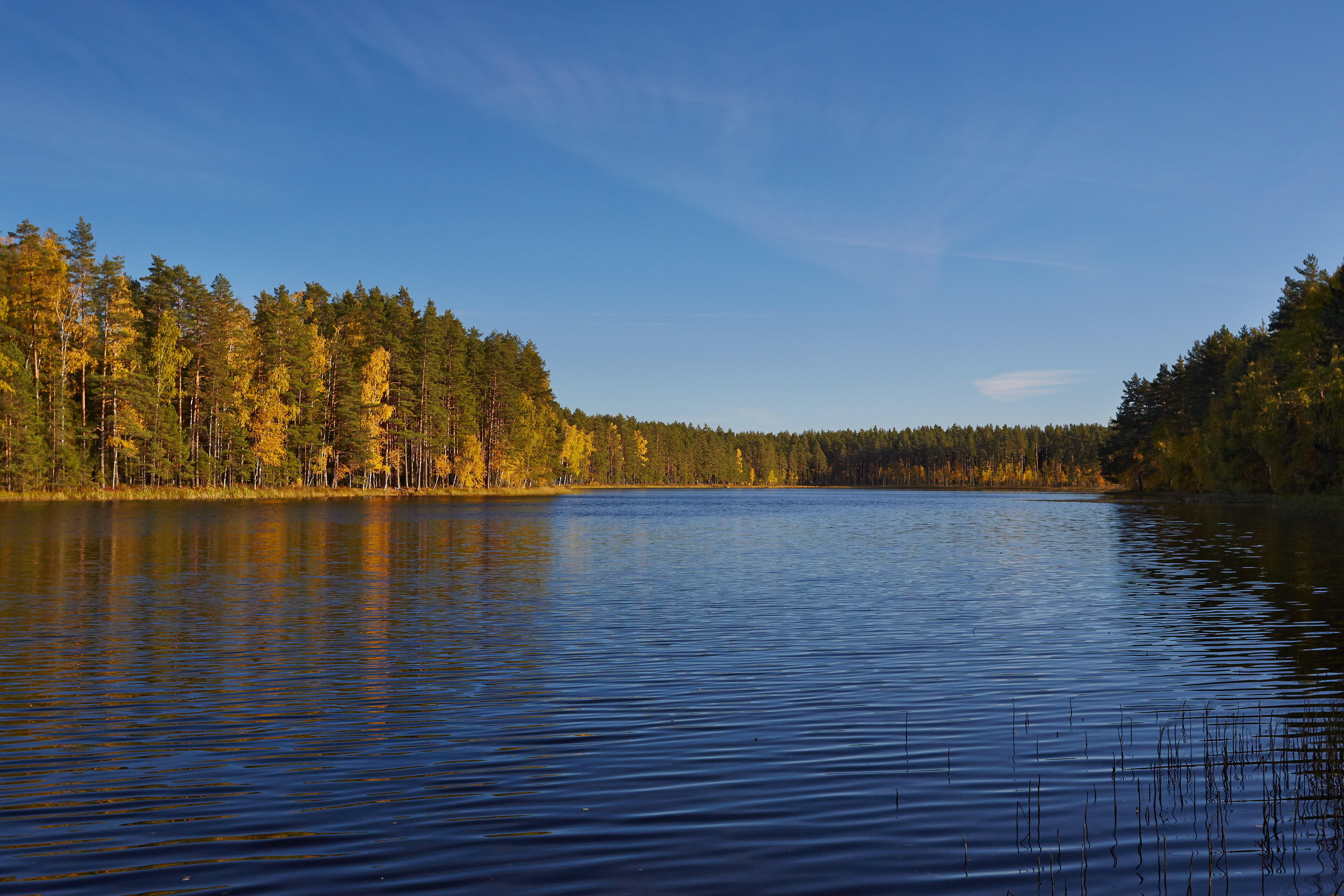 Paidra järv 2013. aasta oktoobris.